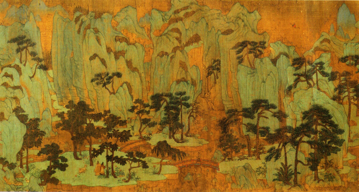 Royaume d'Immortels, section d'un rouleau portatif, encre et couleurs sur soie, dynastie des Yuan; 33x102,9cm. Par le peintre chinois Chen Ruyan ( 1340-1380). Projet de don de M. et Mme dean A Perry – 1996. Cleveland Museum of Art.